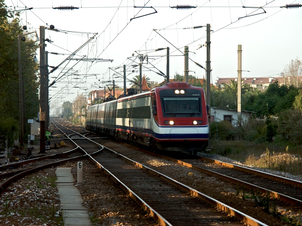 Tipo: Comboio Alfa Pendular 128 [Porto • Campanhã - Lisboa • Santa Apolónia] Local: Granja [Linha do Norte, PK 320] Data e hora: 15 de Outubro de 2008 [17h56] Material: Automotora 4004 [Comboio de Pendulação Activa]